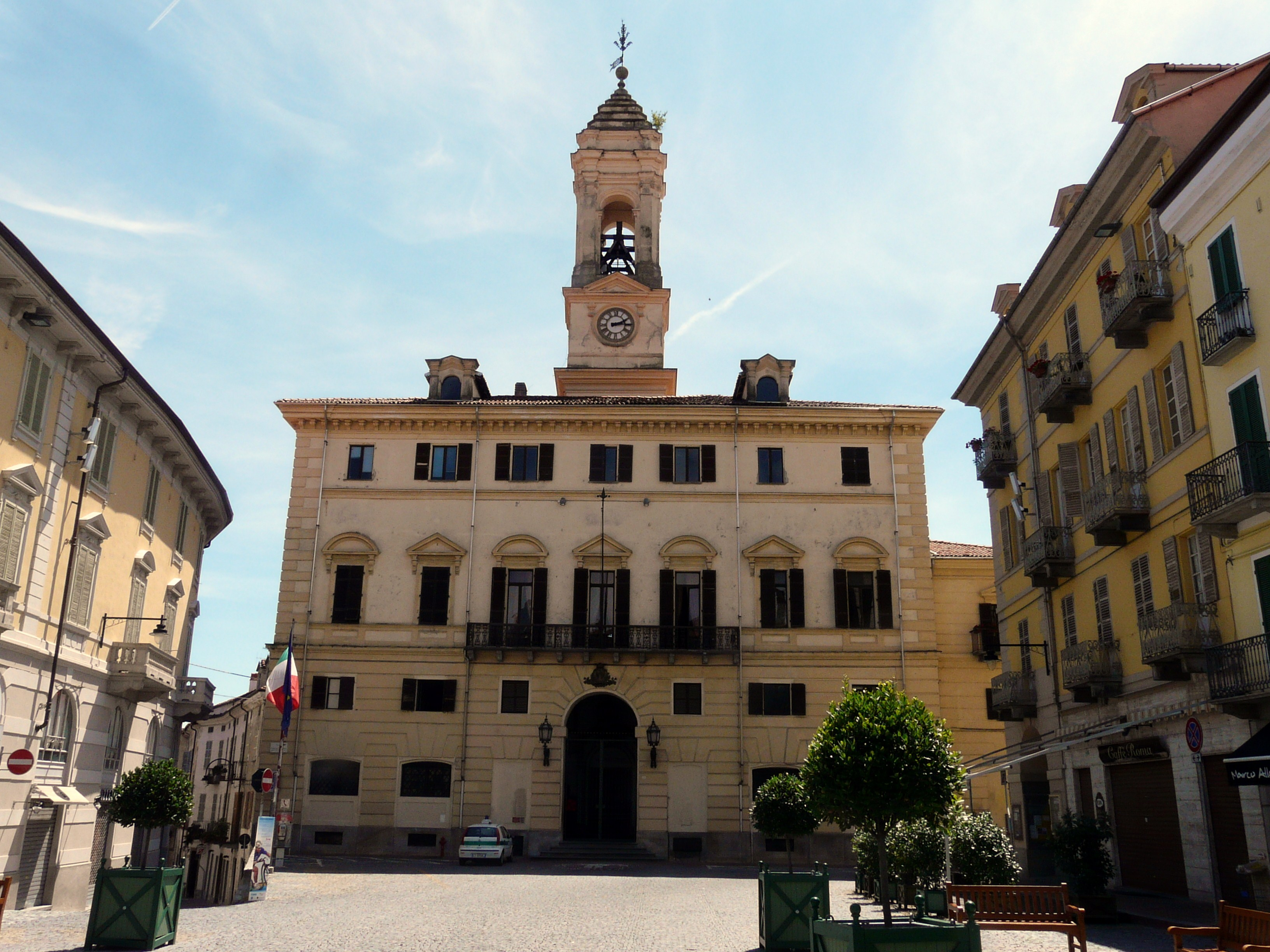 Palazzo municipale, Ivrea, Piemonte, Italia